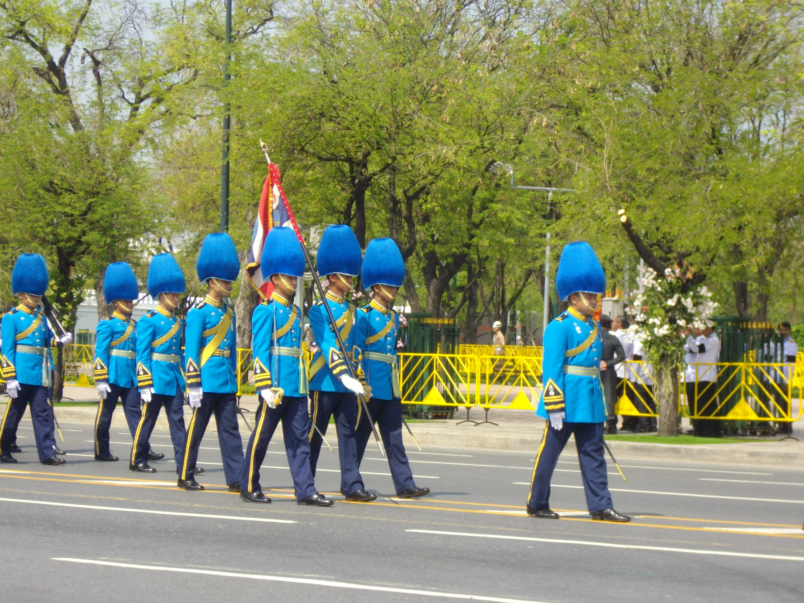 นักเรียนนายเรือจากกรมนักเรียนนายเรืออากาศรักษาพระองค์ โรงเรียนนายเรืออากาศ ในเครื่องแบบเต็มยศรักษาพระองค์ อัญเชิญธงชัยเฉลิมพล นำกองพันทหารเกียรติยศ ในริ้วกระบวนพระอิสริยยศสำหรับพระศพ สมเด็จพระเจ้าภคินีเธอ เจ้าฟ้าเพชรรัตนราชสุดา สิริโสภาพัณณวดี ระหว่างการอัญเชิญพระศพด้วยพระมหาพิชัยราชรถ จากหน้าวัดพระเชตุพนวิมลมังคลาราม ไปยังพระเมรุท้องสนามหลวง วันที่ 9 เมษายน พ.ศ. 2555